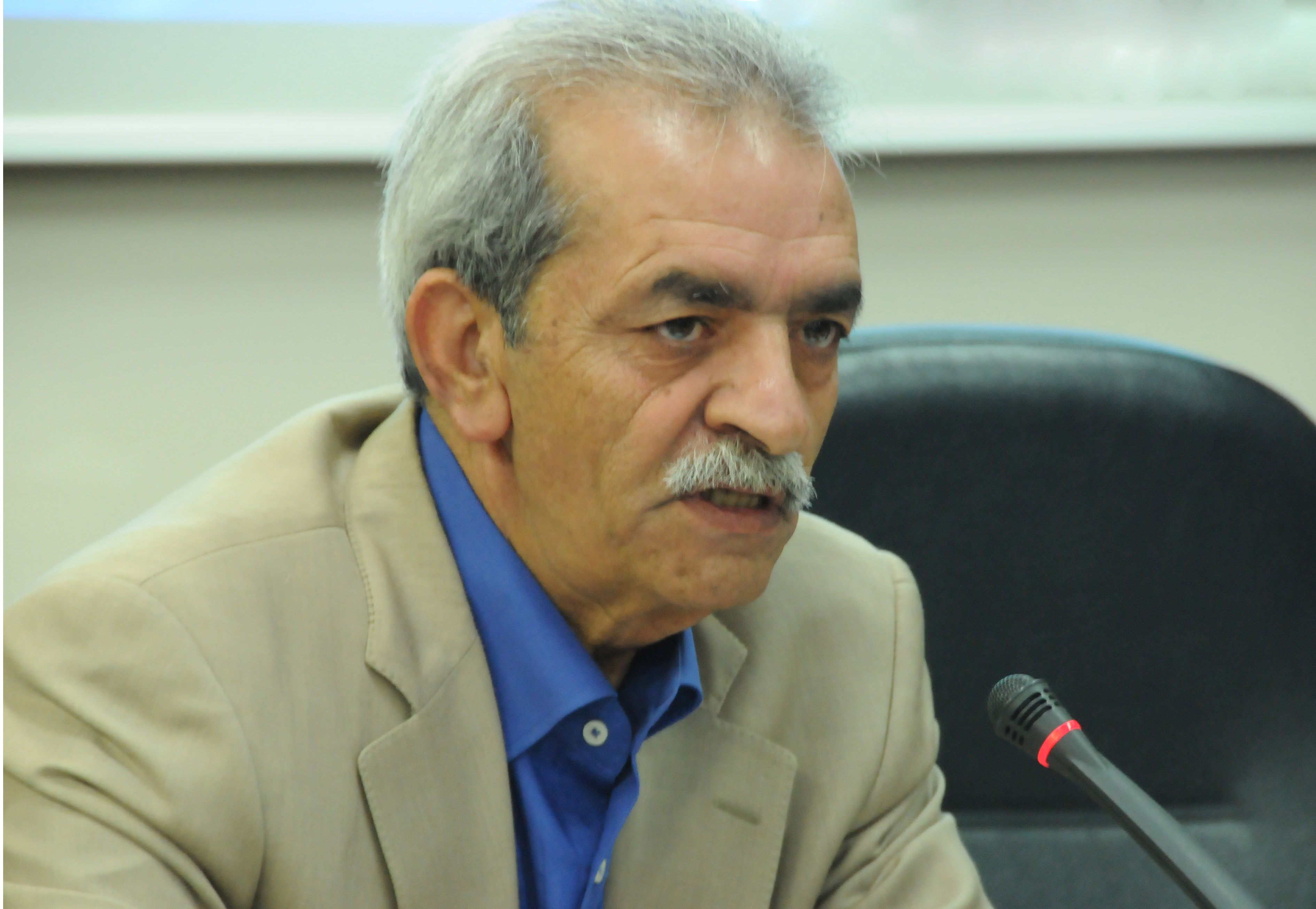 shafeii